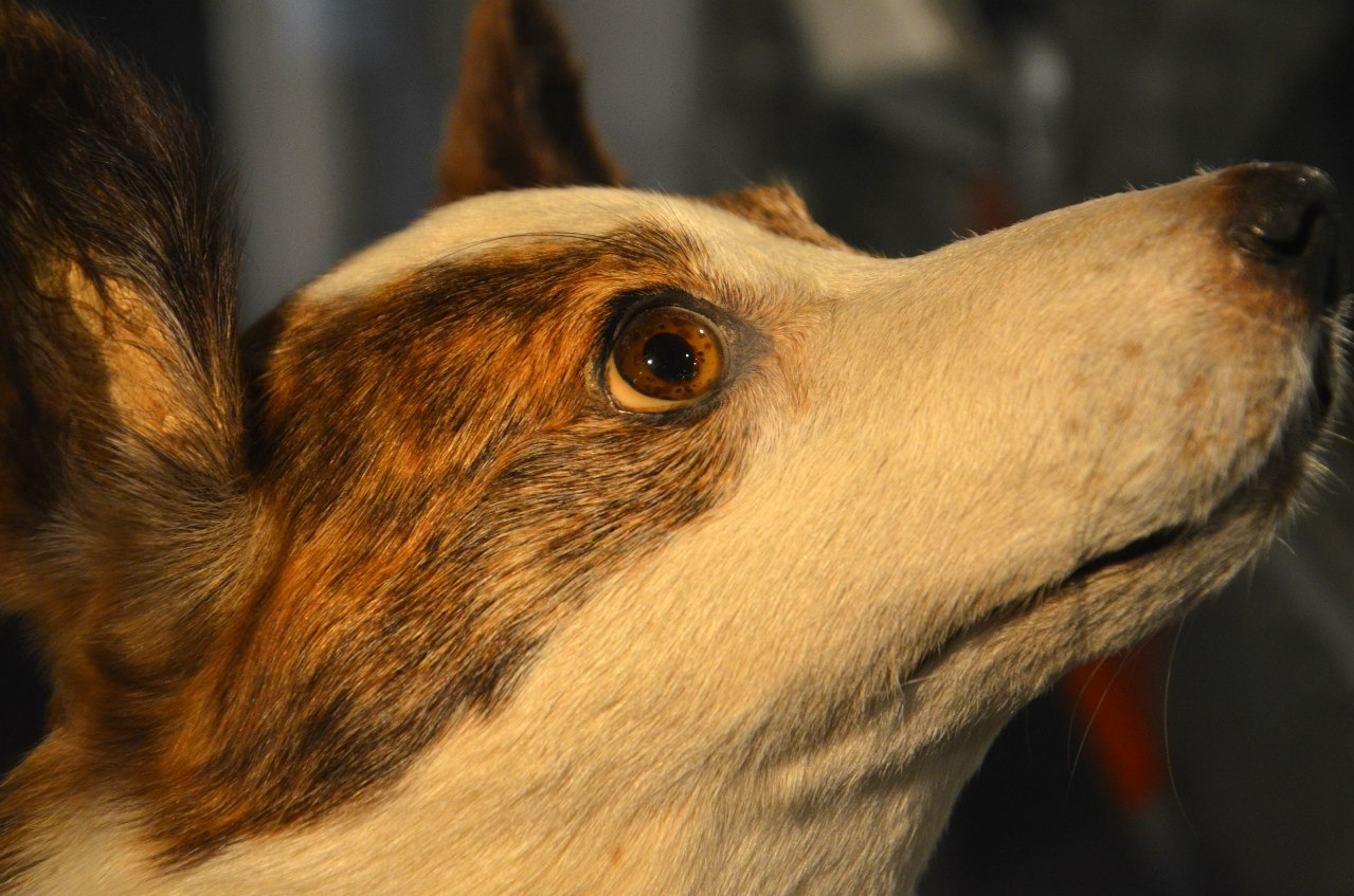 Собака Стрелка в Музее Космонавтики в Москве